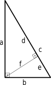 Representação gráfica do Teorema de Pitágoras.